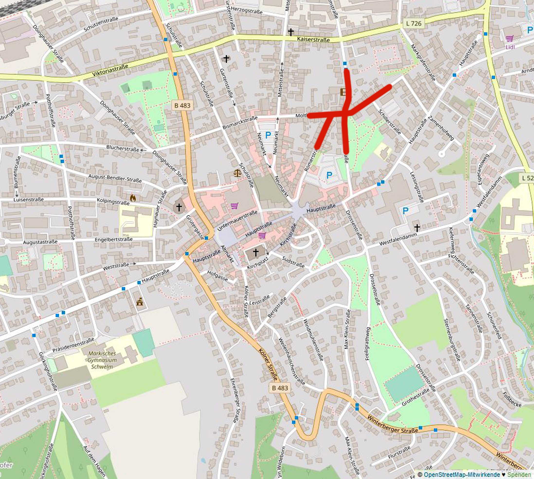 Lage von Bau- und Bodendenkmälern in Schwelm, rot markiert ein Bereich Römerstraße, Moltkestraße, Wilhelmstraße. Kartenvorlage aus OpenStreetMap wurde um Markierung (rot) ergänzt.